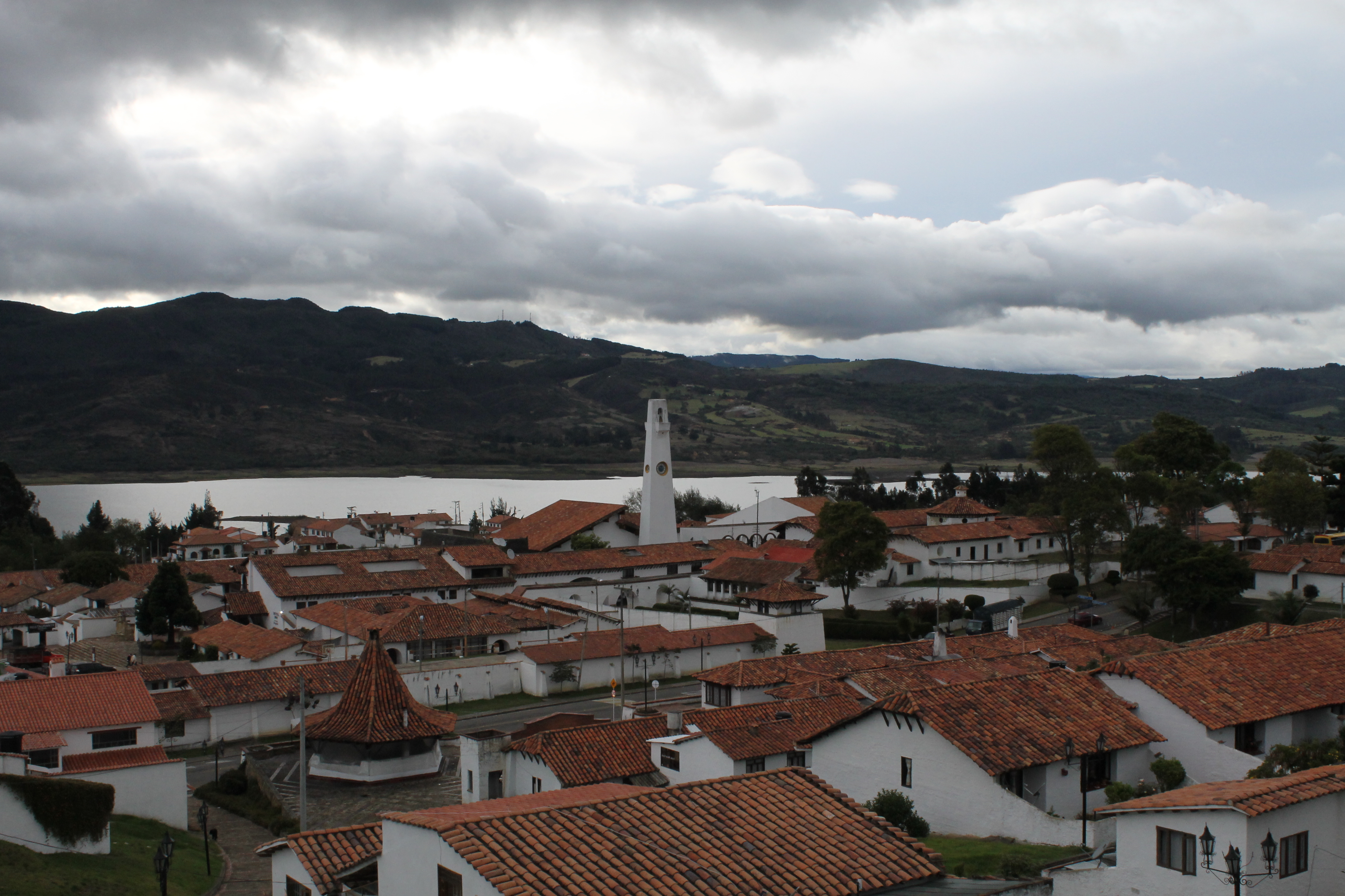 Panorámica del Casco Urbano del municipio de Guatavita, Cundinamarca, Colombia.